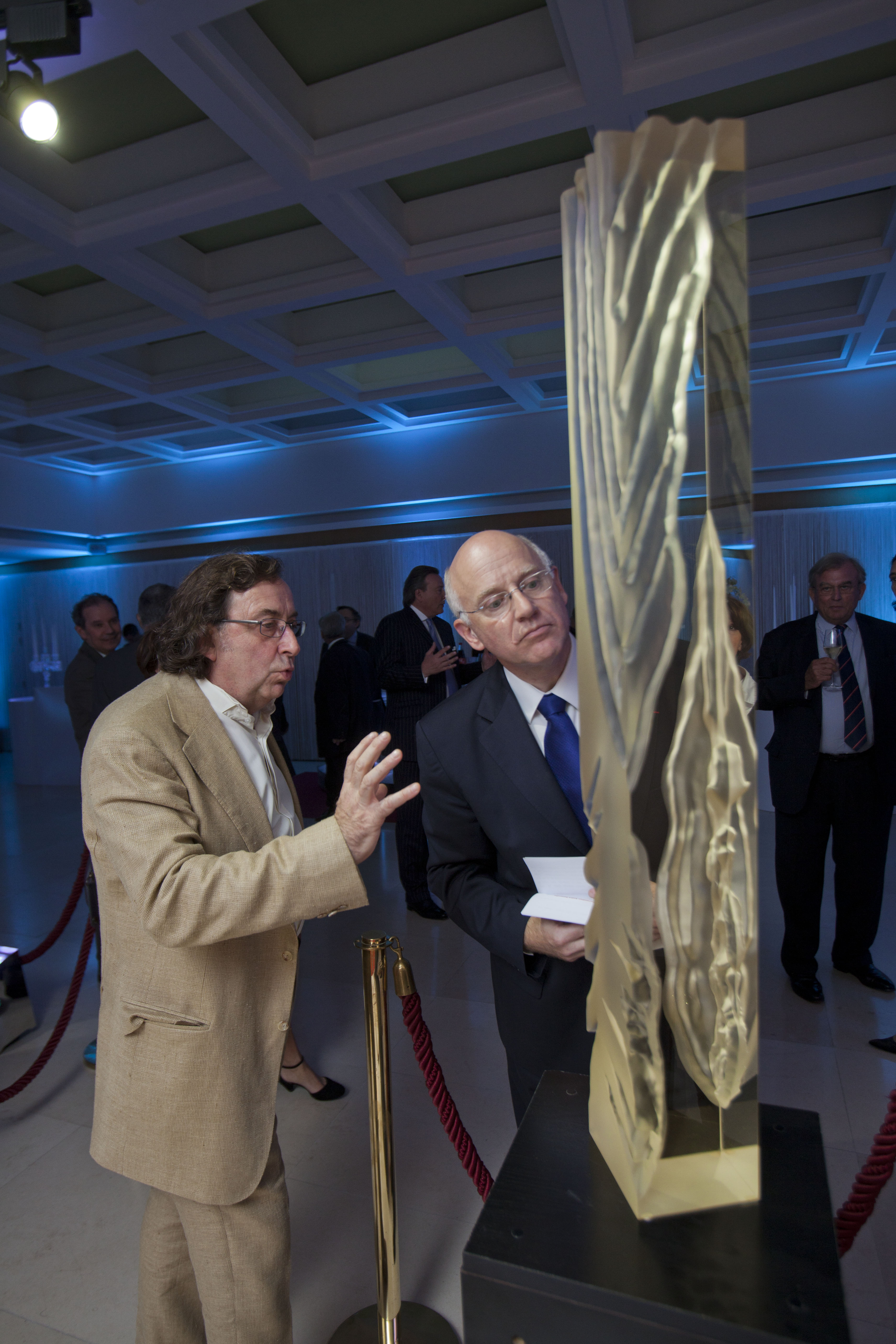 Photo prise durant le vernissage de l'exposition "La noblesse du verre" chez AG2R La Mondiale Boulevard Haussmann à Paris